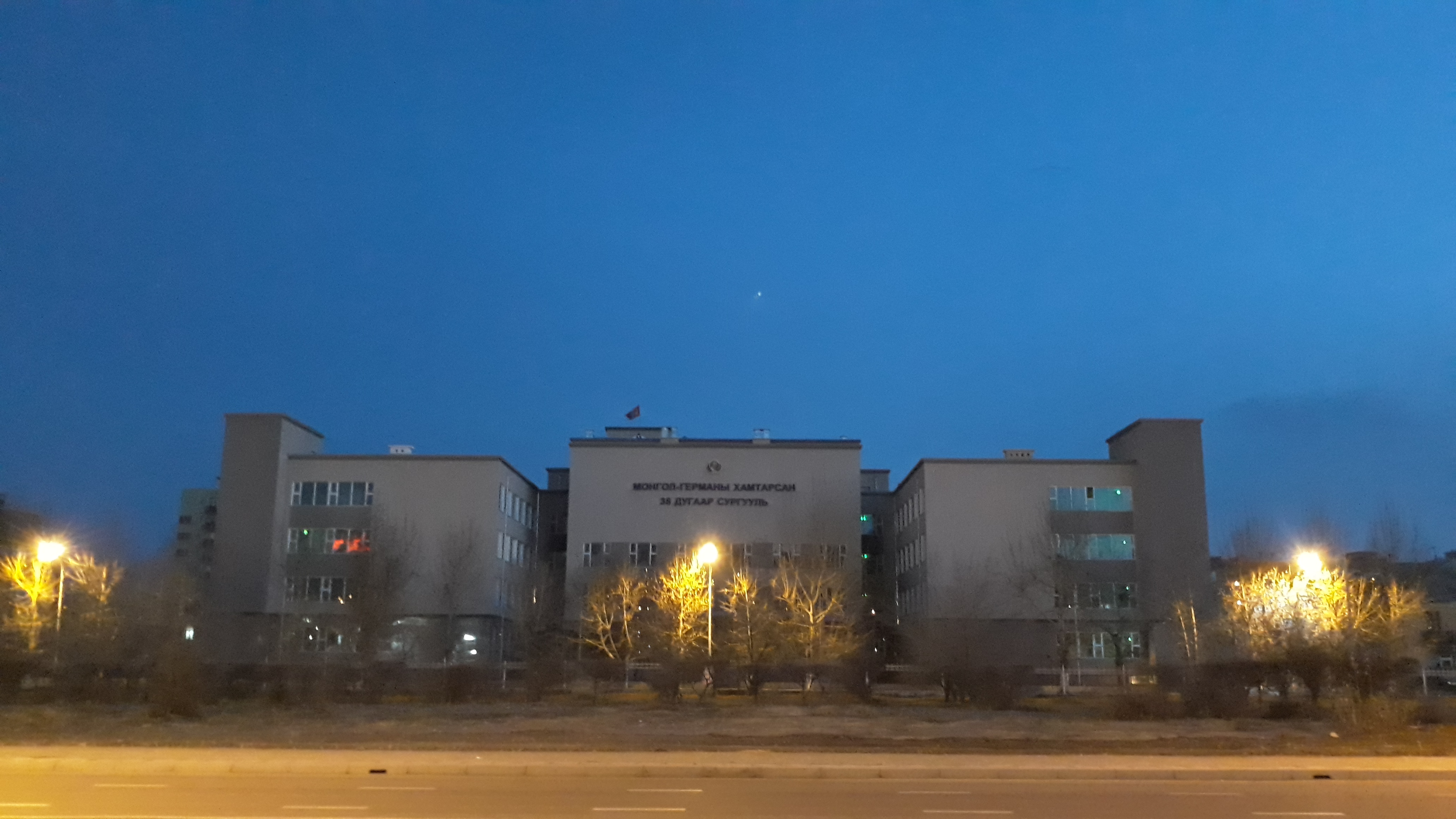 Монгол: Ж. Од-Эрдэмийн 2017 10 сарын 23-ны өглөөний 06:49-д авсан зураг